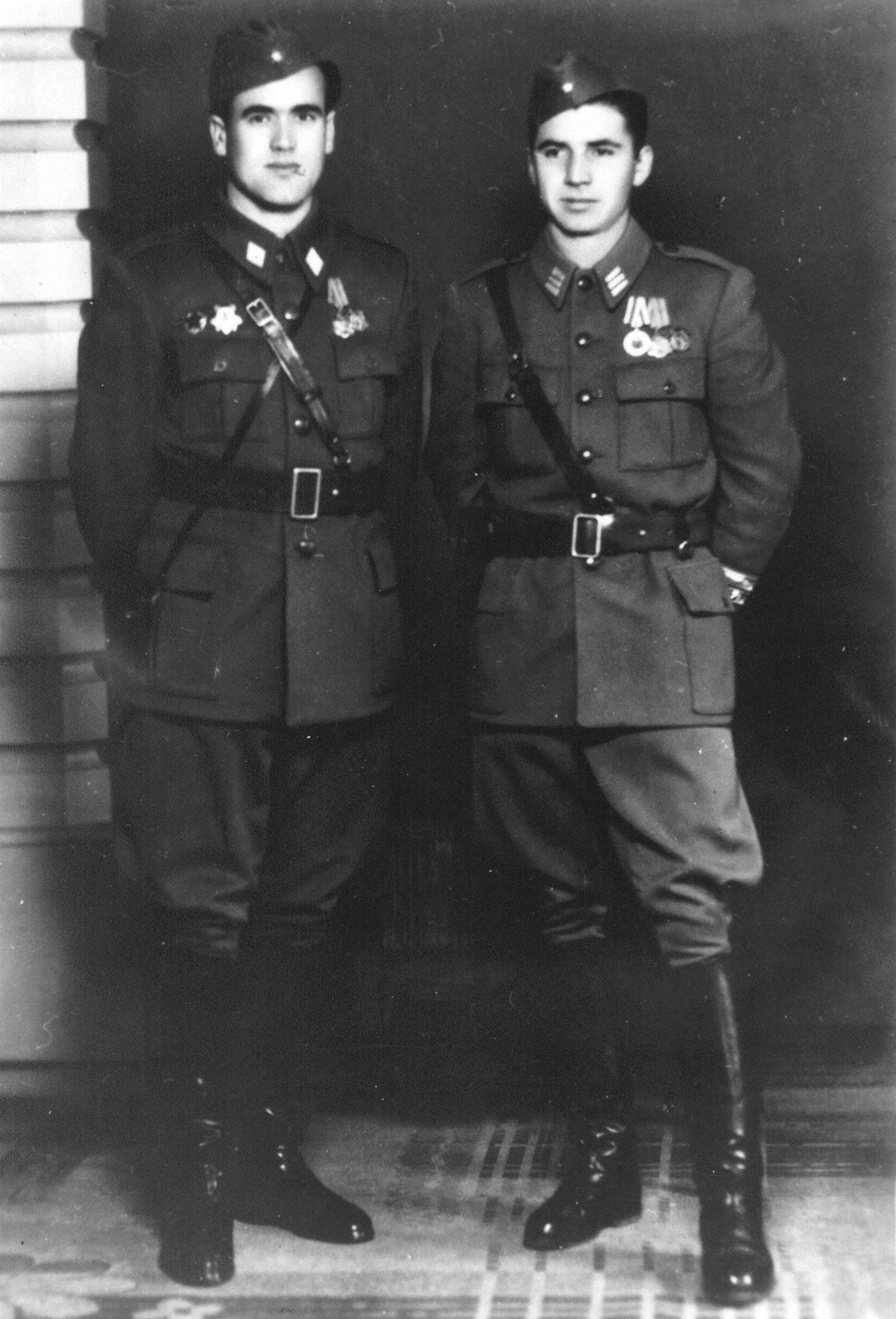 Narodni heroj Vlado Šćekić, politički komesar Prve proleterske brigade, te Prve proleterske divizije (desno) i general pukovnik Vaso Jovanović, načelnik štaba Prve proleterske divizije, te komandant Prve proleterske divizije.